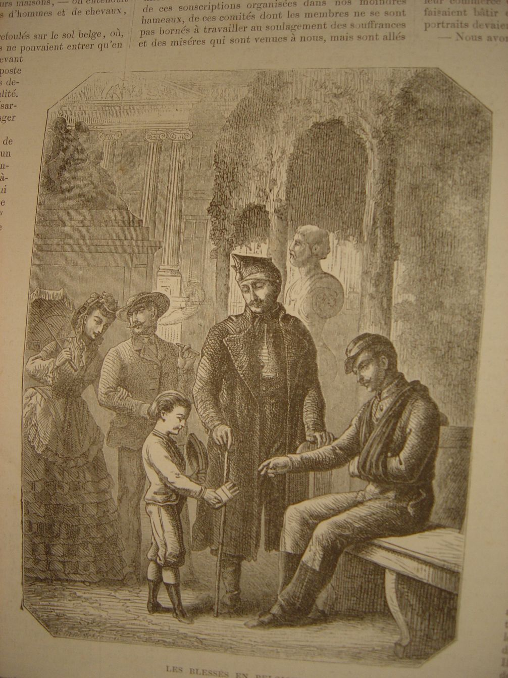 les blessés français de la guerre Franco-Prusse en Belgique